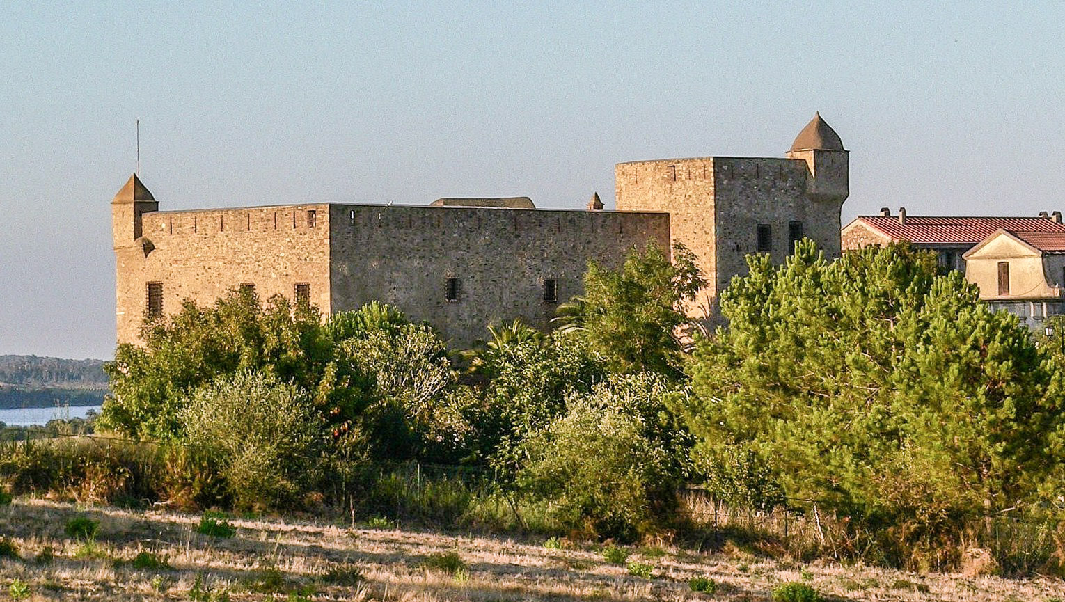 Fort de Matra Ce fort abrite le Musée départemental d'archéologie Jérôme Carcopino Aleria, Haute-Corse